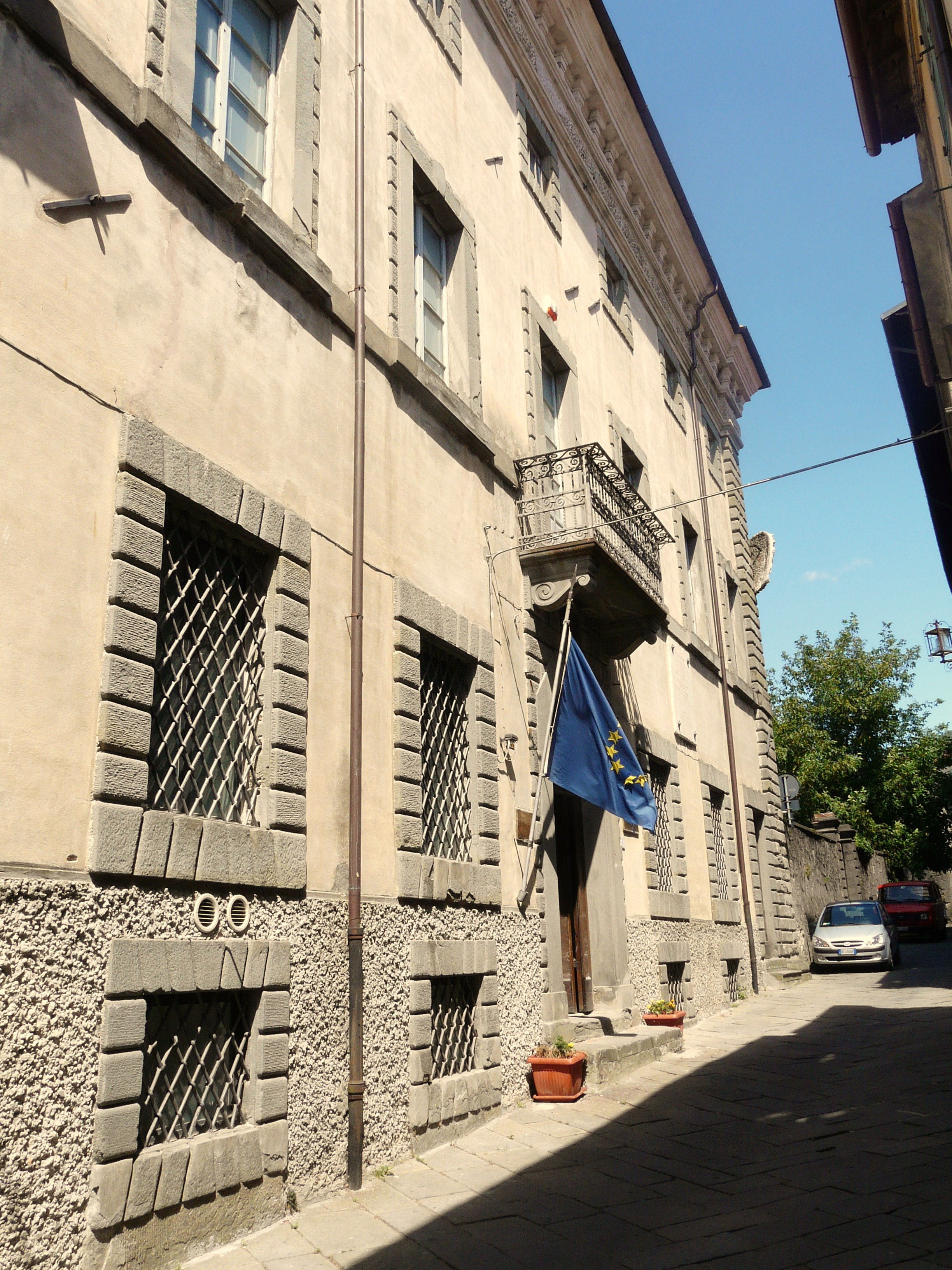 Museo della Stampa, Fivizzano, Toscana, Italia